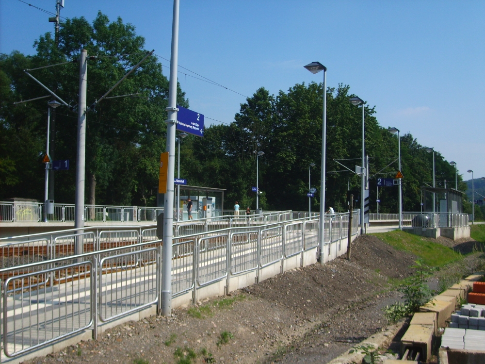 Bahnhof Velbert-Nierenhof, Germany